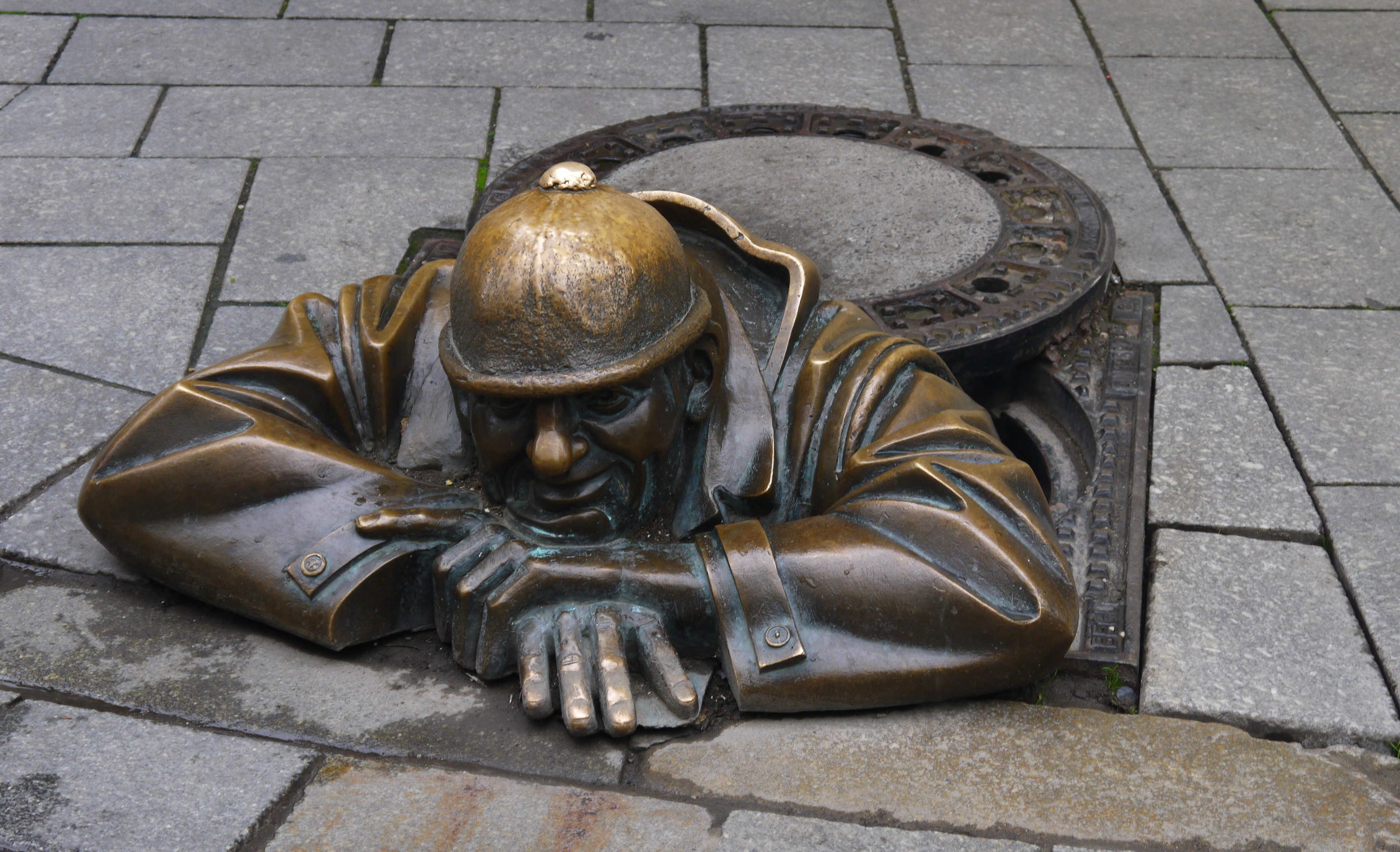 Cumil czyli Podglądacz